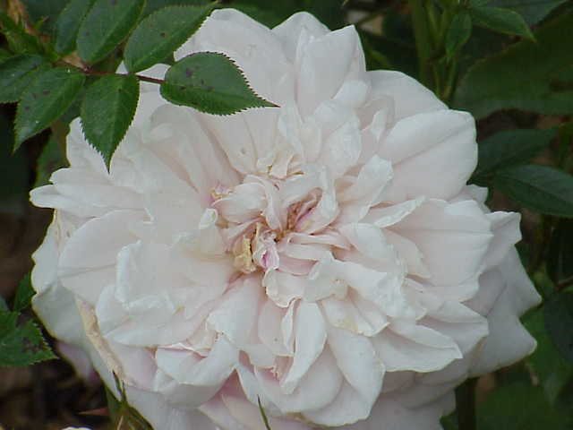 Species: Rosa sp. Family: Rosaceae Cultivar: Souvenir de la Malmaison, Jean Béluze 1843 Image No. 266